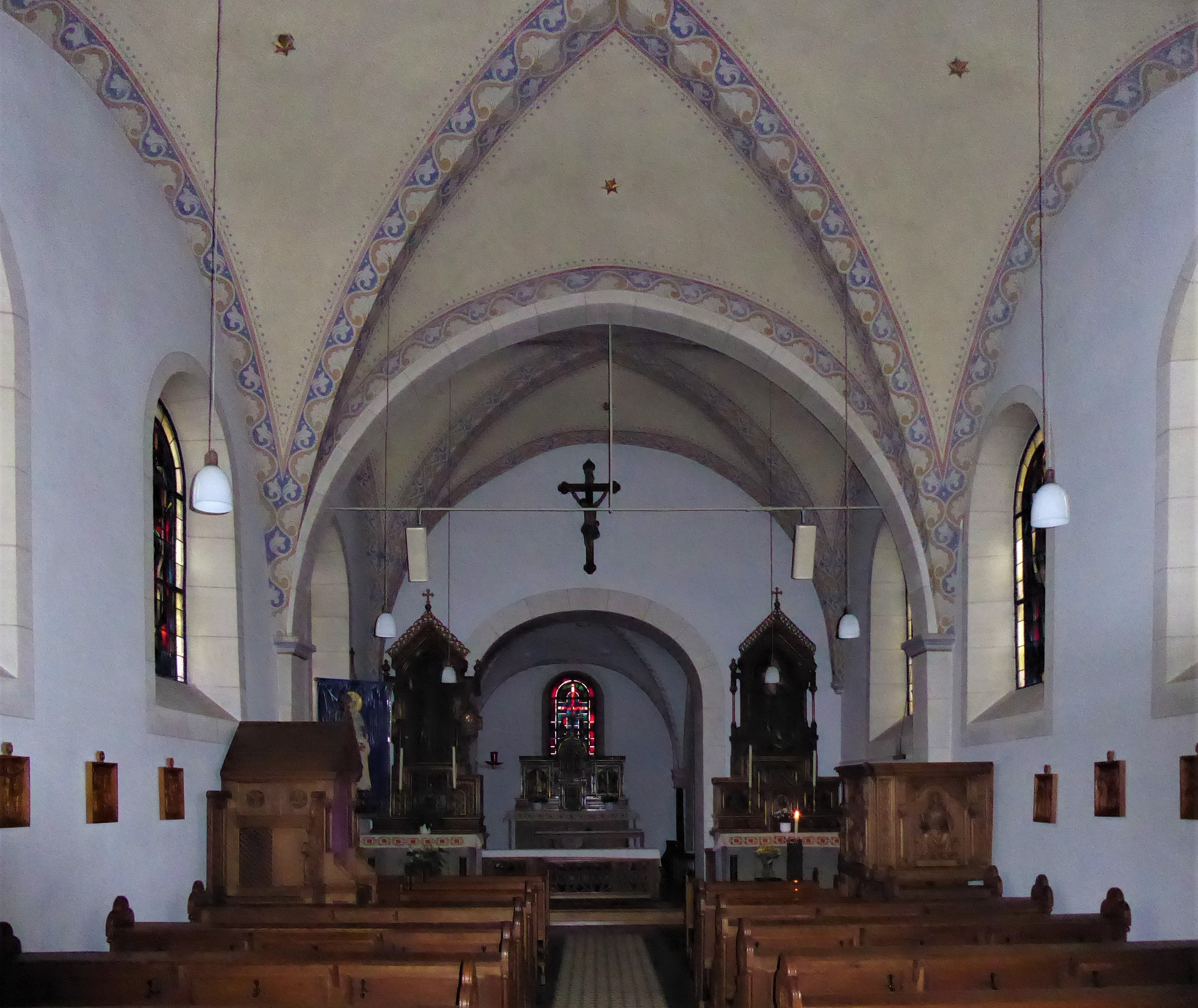 St. Johann Baptist (Niedermerz)